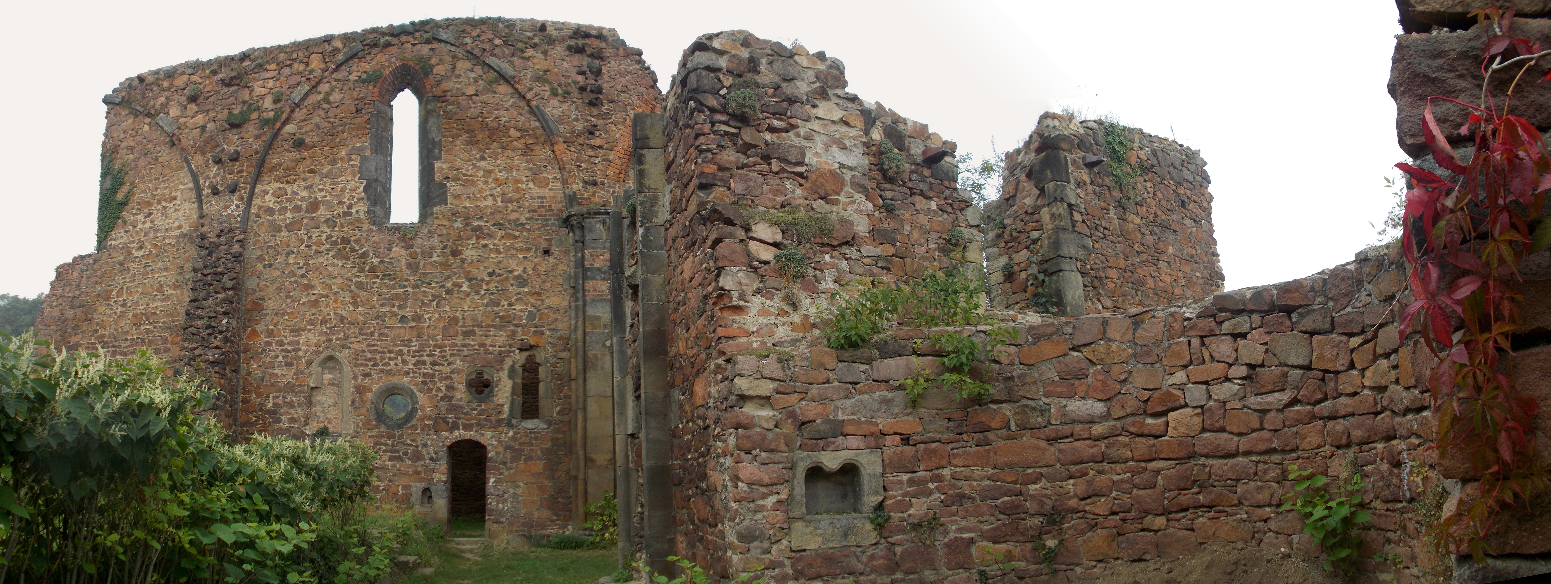 Panorama Klosterruine Meißen